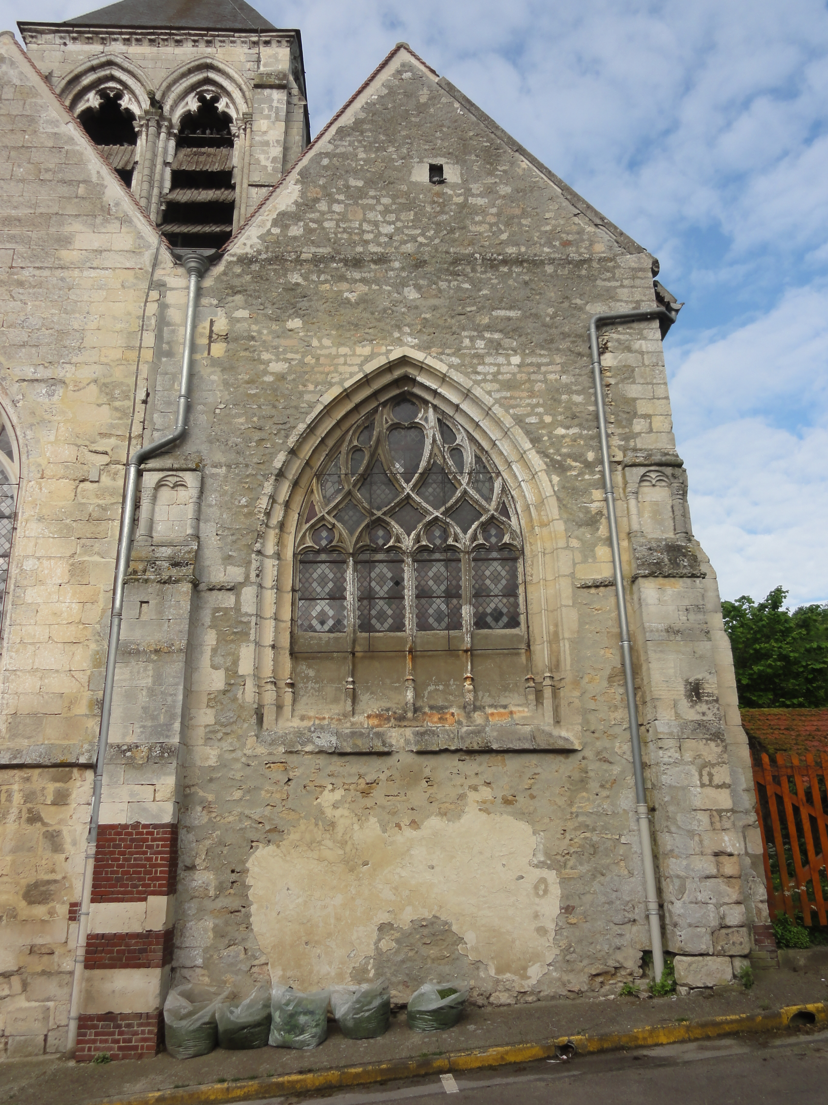 Chevet du vaisseau central.